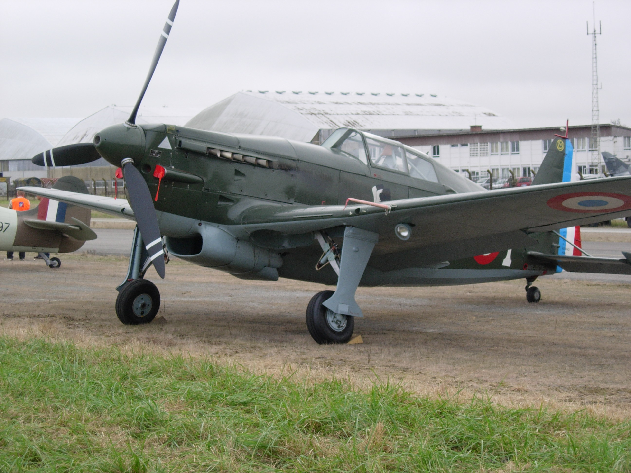 D-3801 suisse representant un MauraneSaulnier406 français au meeting Rennes 2007. L'immatriculation HB-RCF est visible tout petit en arriere. Numéro de construction 194, manufacteur EIDG. FLUGZEUGWERK (F+W) EMMEN, en 1942